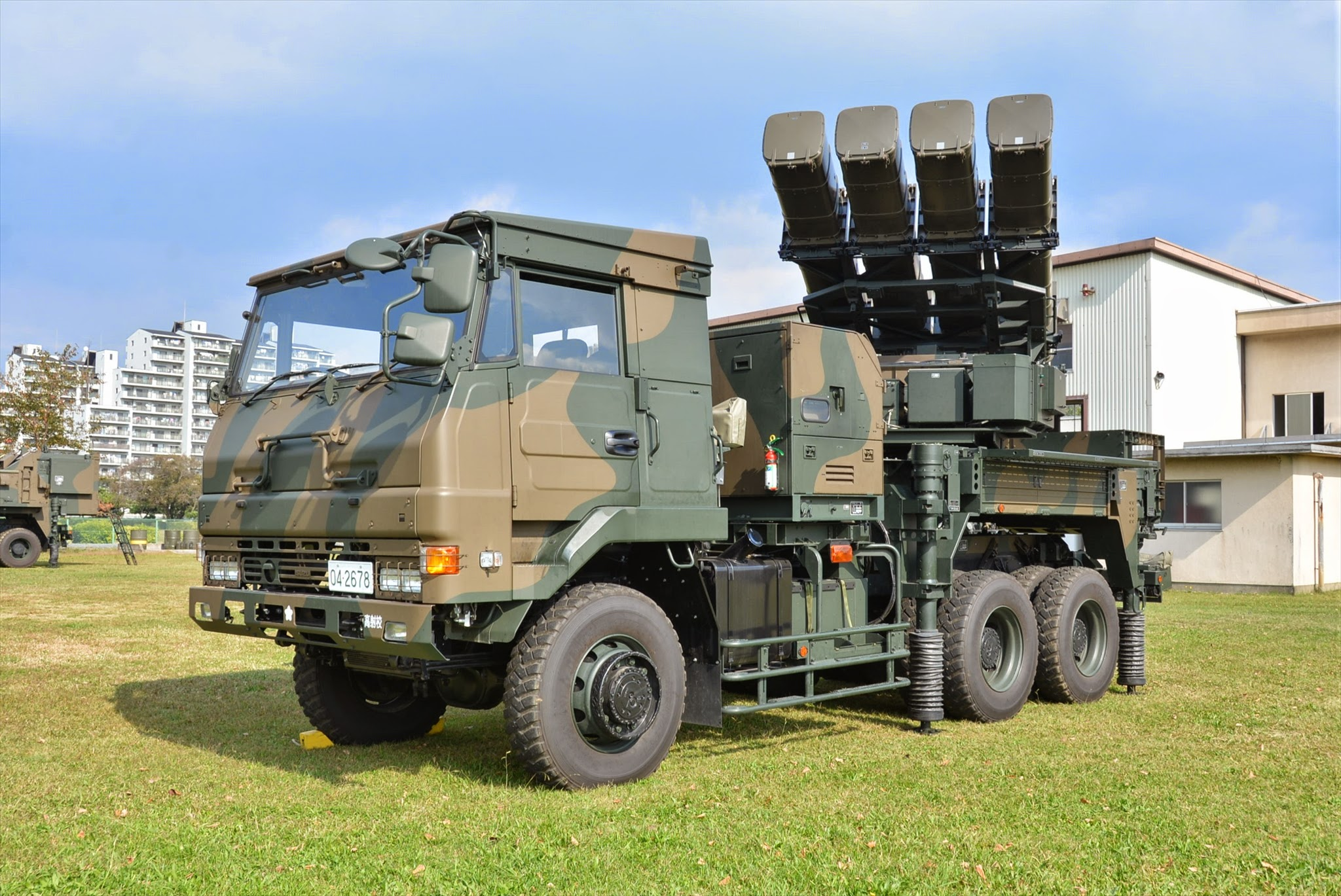 １１式短距離地対空誘導弾 高射学校・11短SAM